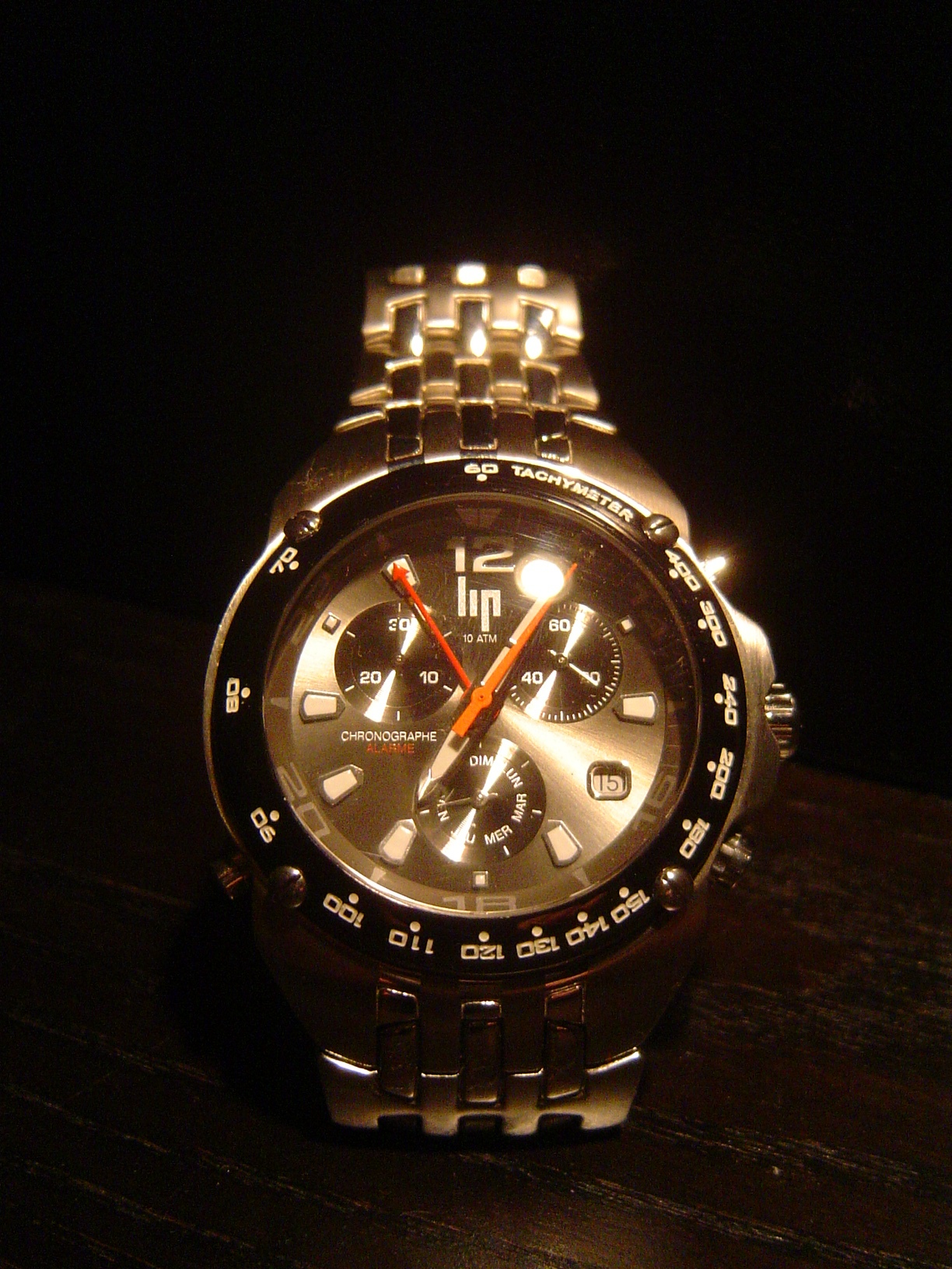 Montre Lip